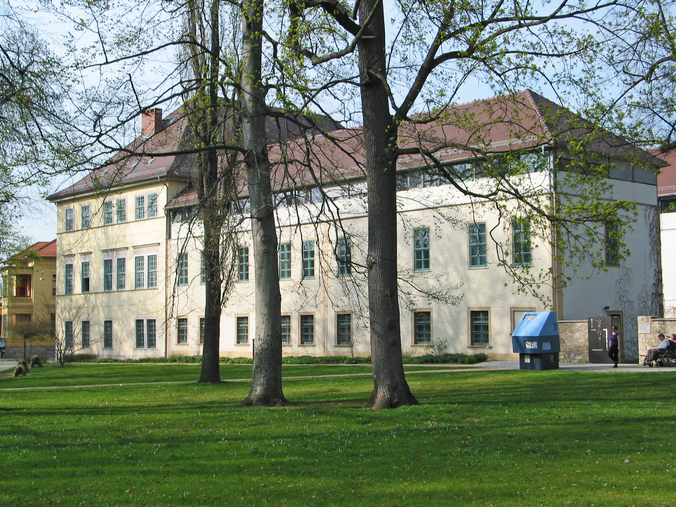 Blick vom Park zur Südseite des Museums für Ur- und Frühgeschichte Thüringens in Weimar.